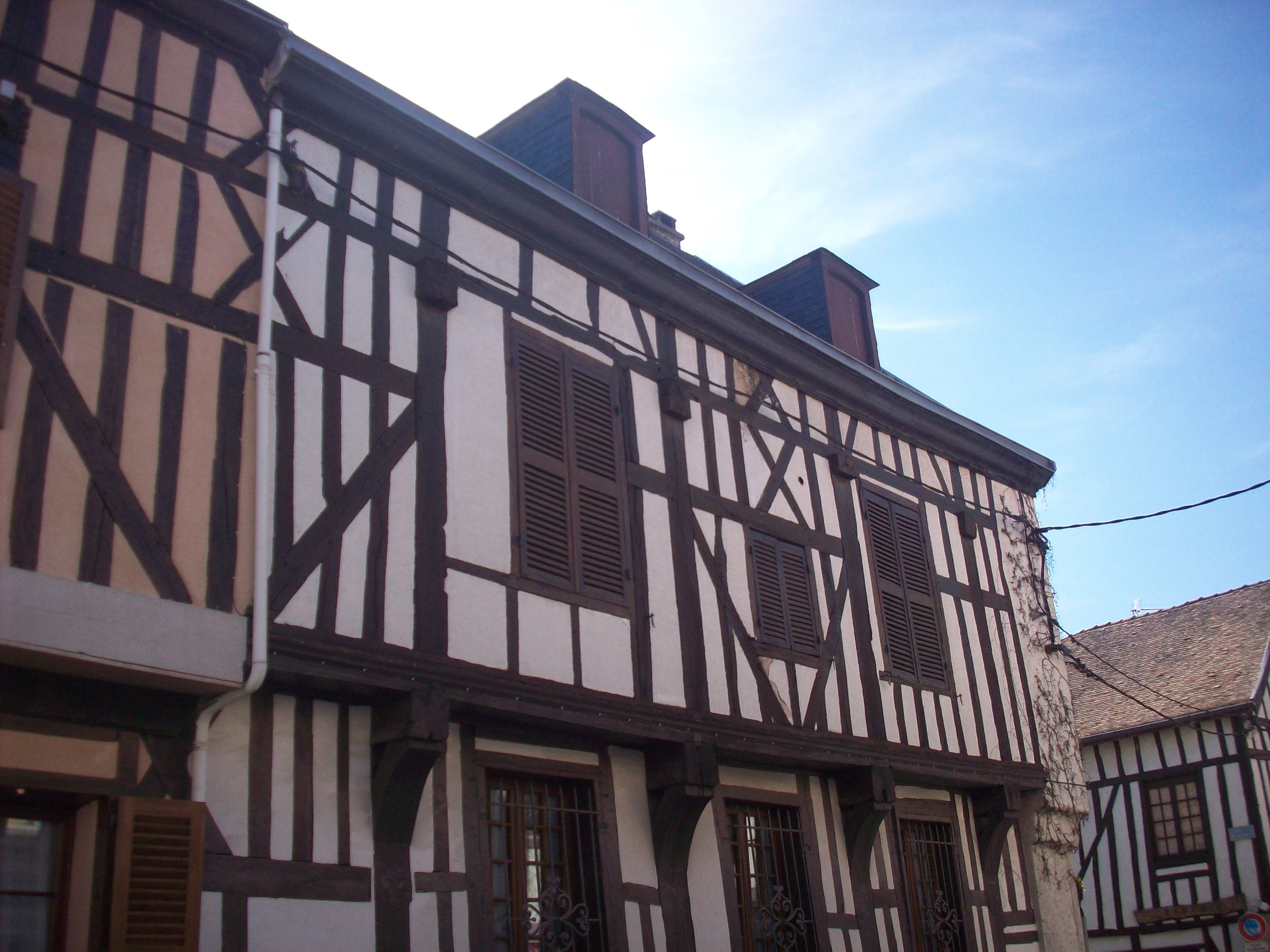 Maison typique du centre d'Aÿ